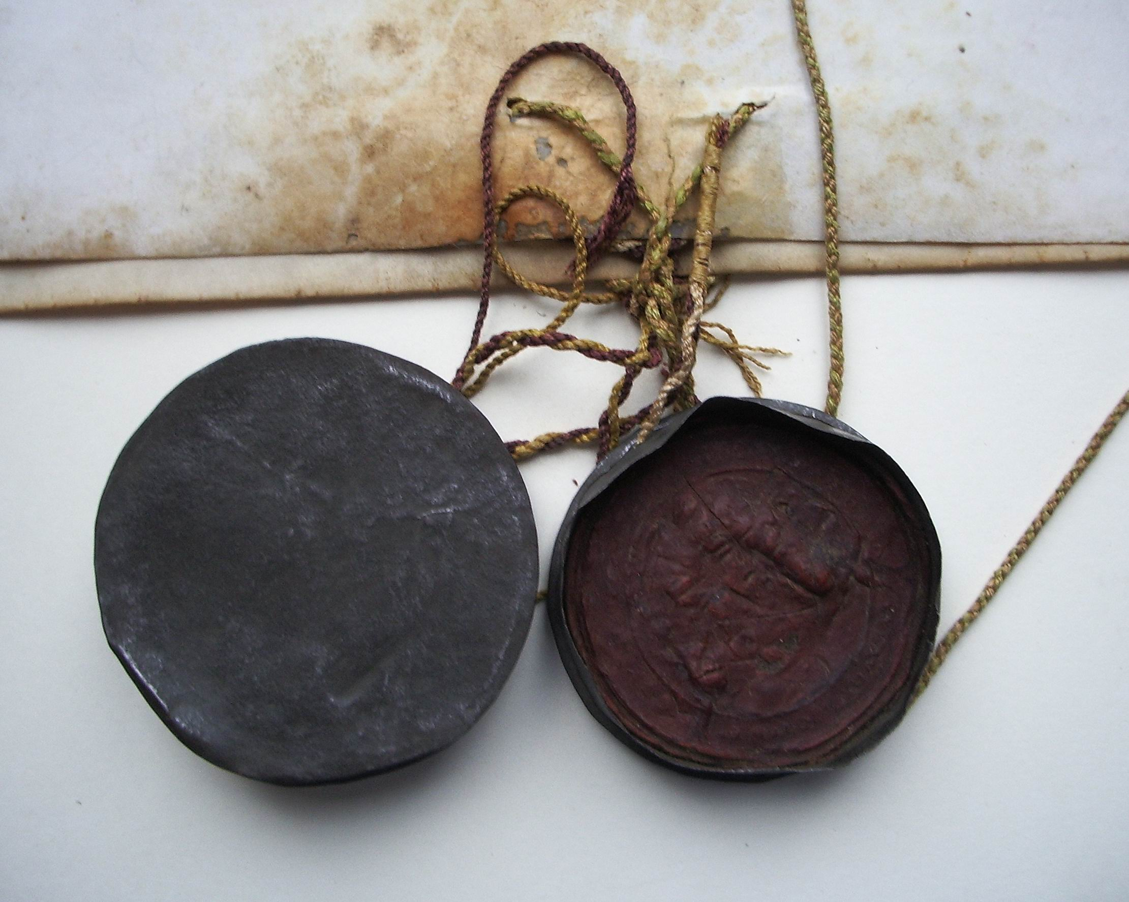 Sceau de Charles Emmanuel 1er de Savoie confirmant les privilèges de la ville de Nice en 1587.